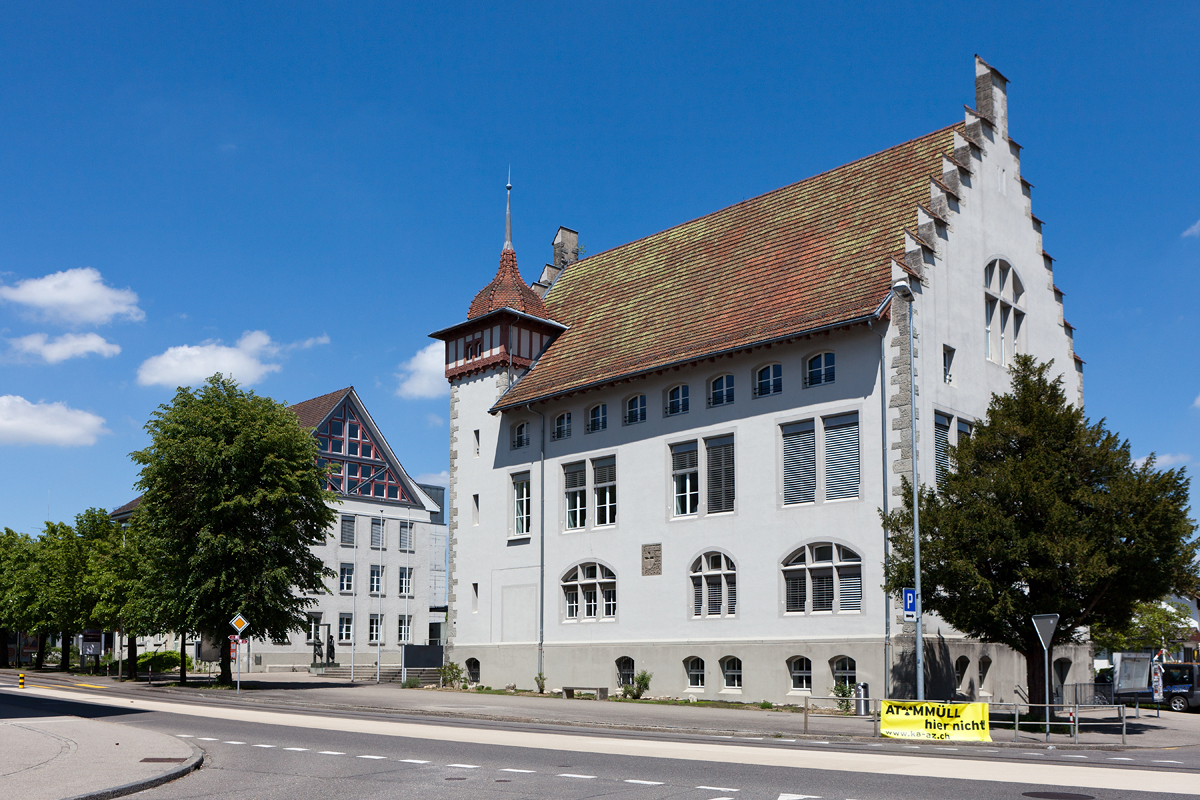 Gemeindehaus an der Tramstrasse in Suhr (Kulturgut, Liste C)